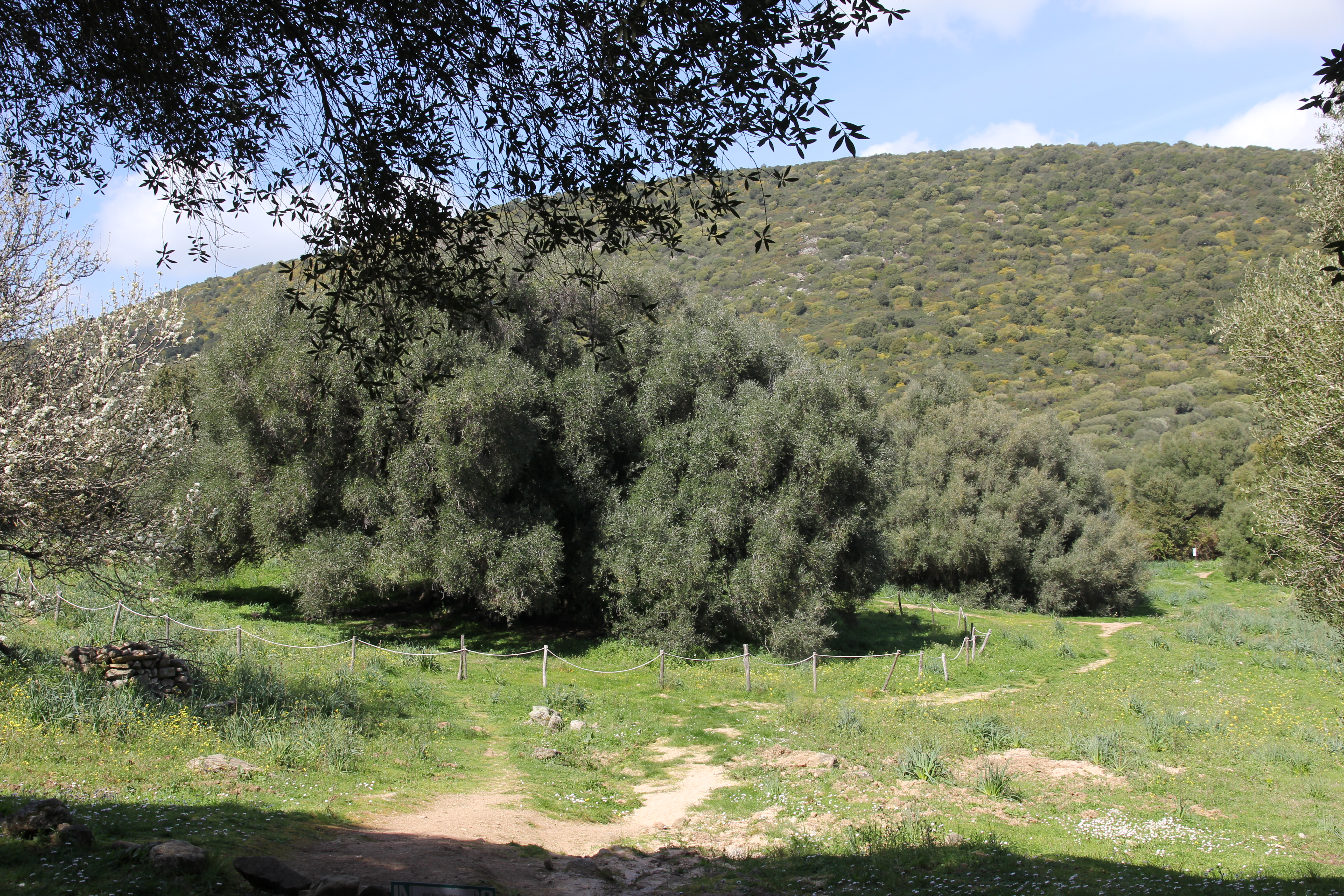 Luras - Olivastri millenari